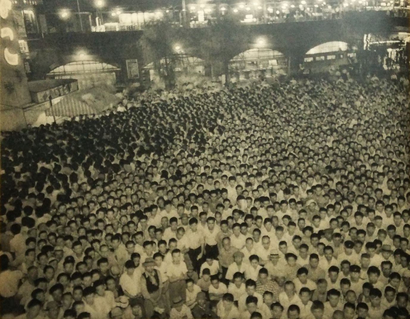 街頭テレビに群がる観客（国際プロレスリング大会の力道山戦放映時）